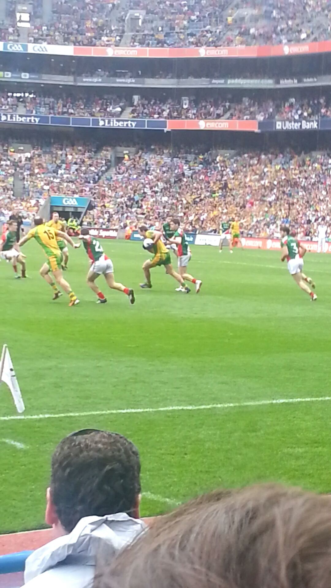 quart de finale du All-Ireland 2013